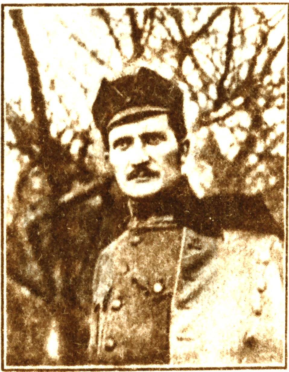 Юліан Буцманюк - Український Січовий Стрілець